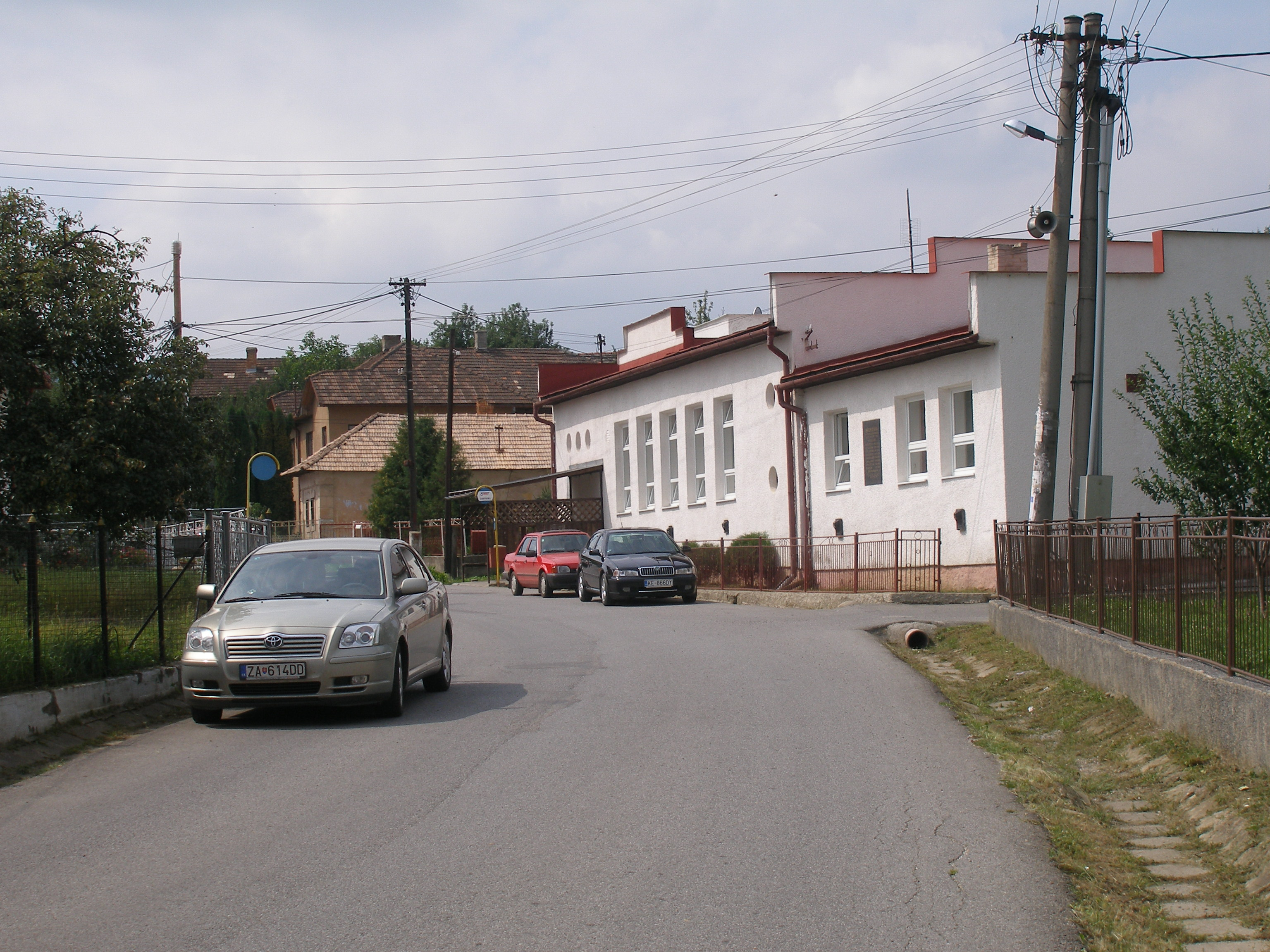 Šarišská obec Hrabkov